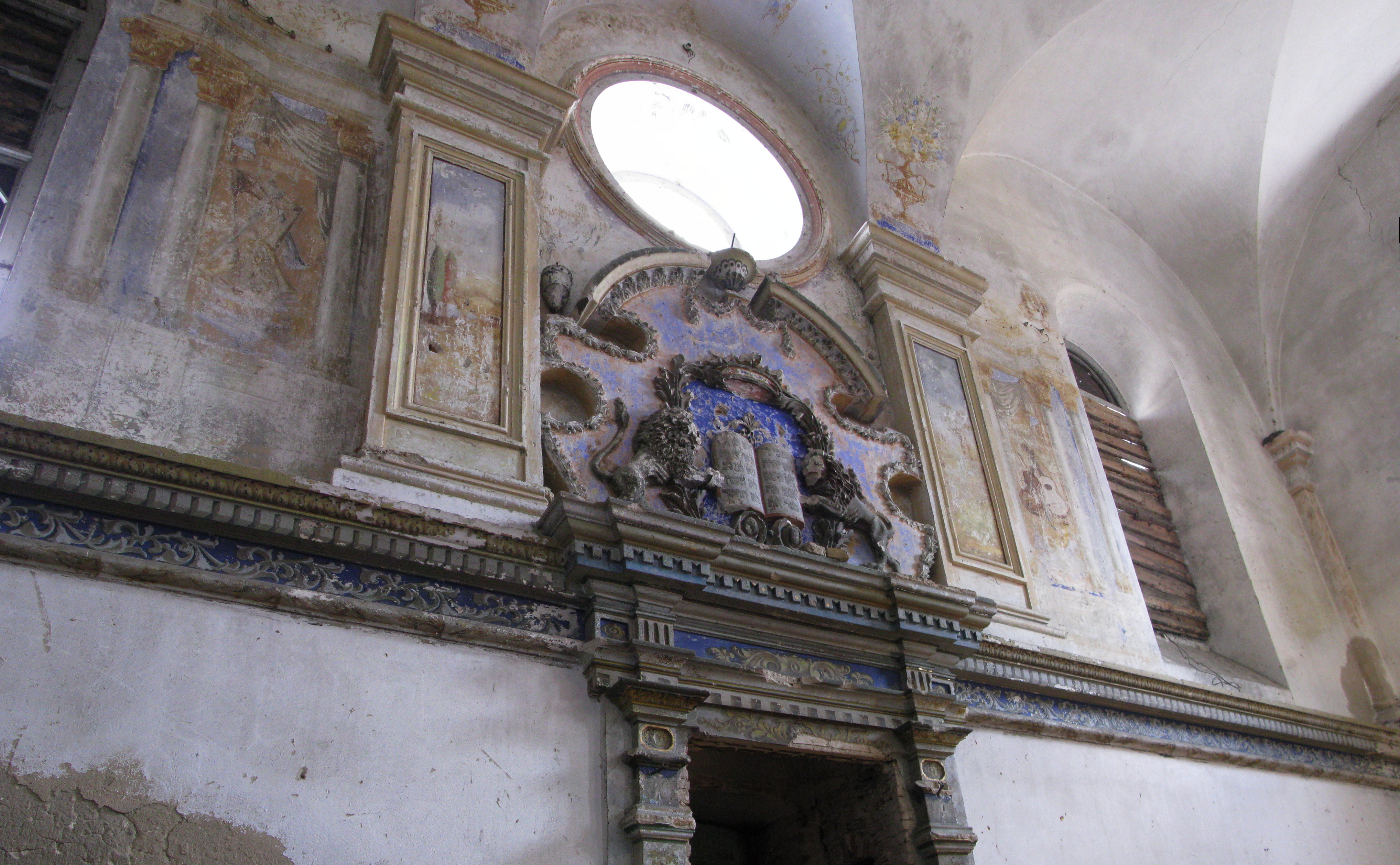 Беларуская (тарашкевіца): Будынак былой сынагогідэкаратыўнае аздабленьне:фрэскавыя кампазыцыі, арнамэнтальная лепка. г. Слонім This is a photo of Belarusian heritage monument. Reference number: 412Г000509 ( WLM)